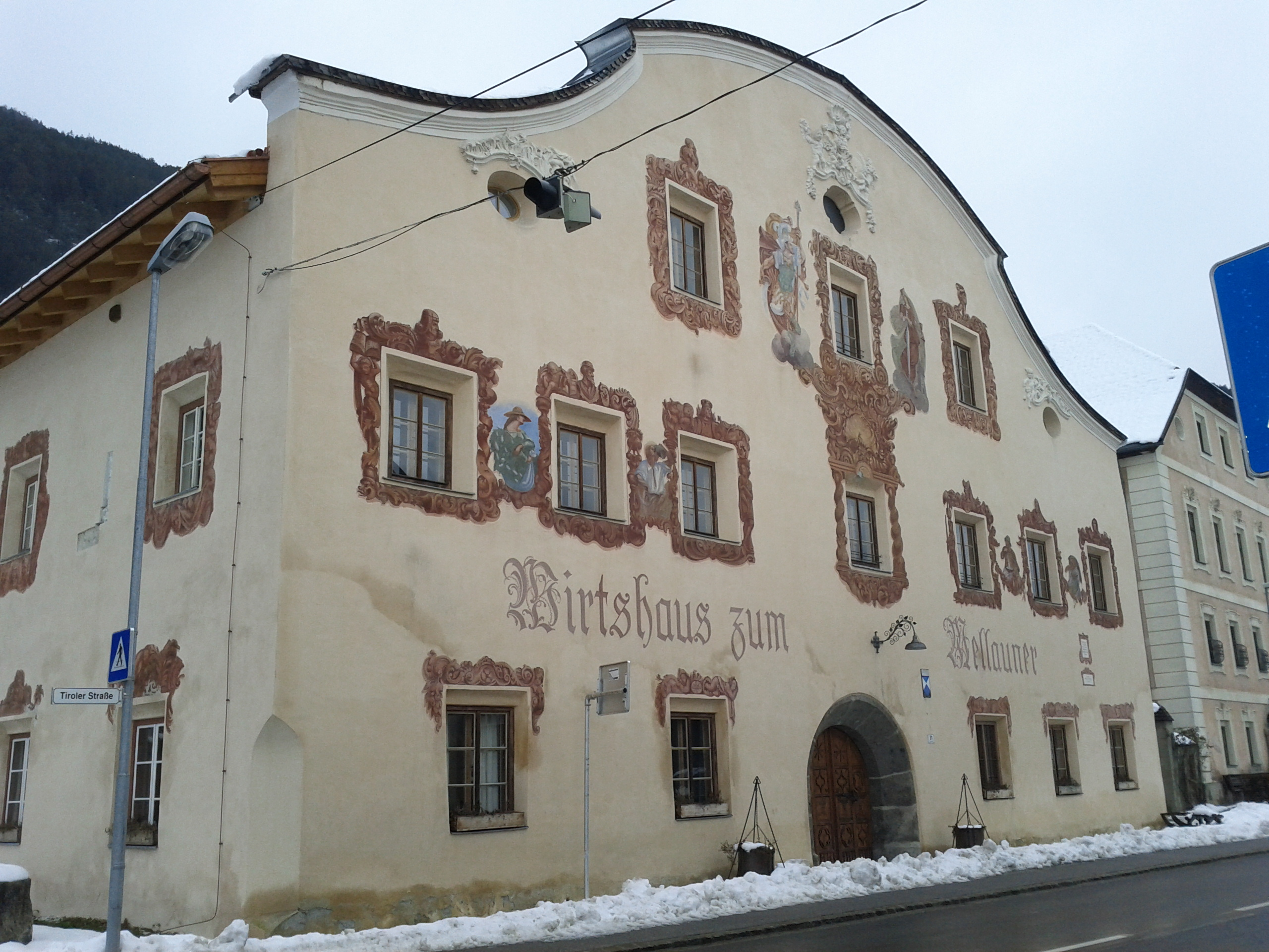 Gasthaus Mellaunerhof, ehem. Gasthaus Öttl - Pettnau, Tiroler Straße 31 This media shows the remarkable cultural object in the Austrian state of Tyrol listed by the Tyrolean Art Cadastre with the ID 68461. (on tirisMaps, pdf, more images on Commons, Wikidata)